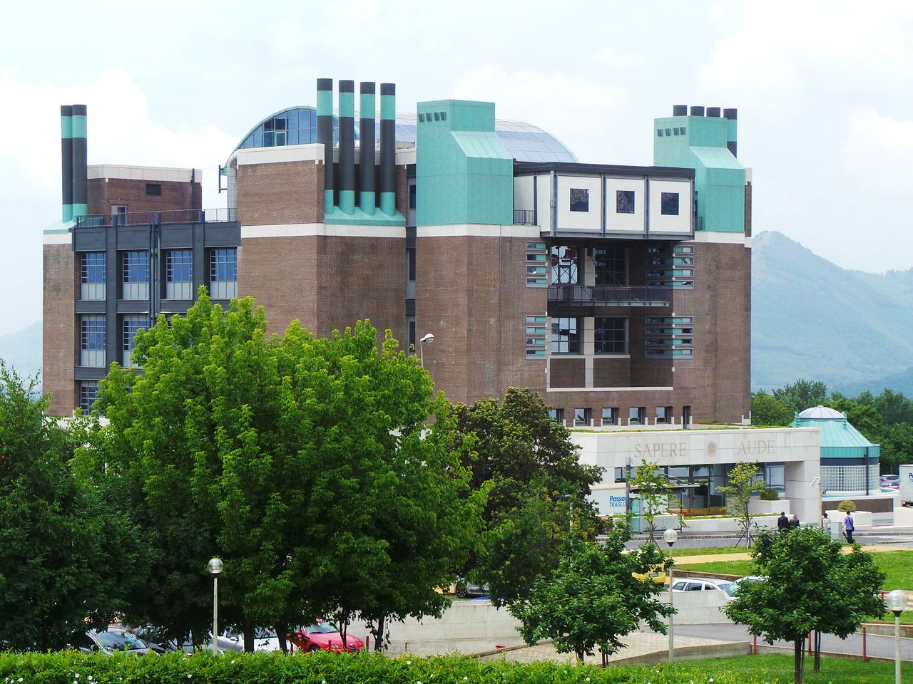 Vista della biblioteca scientifica dell'Università di Salerno